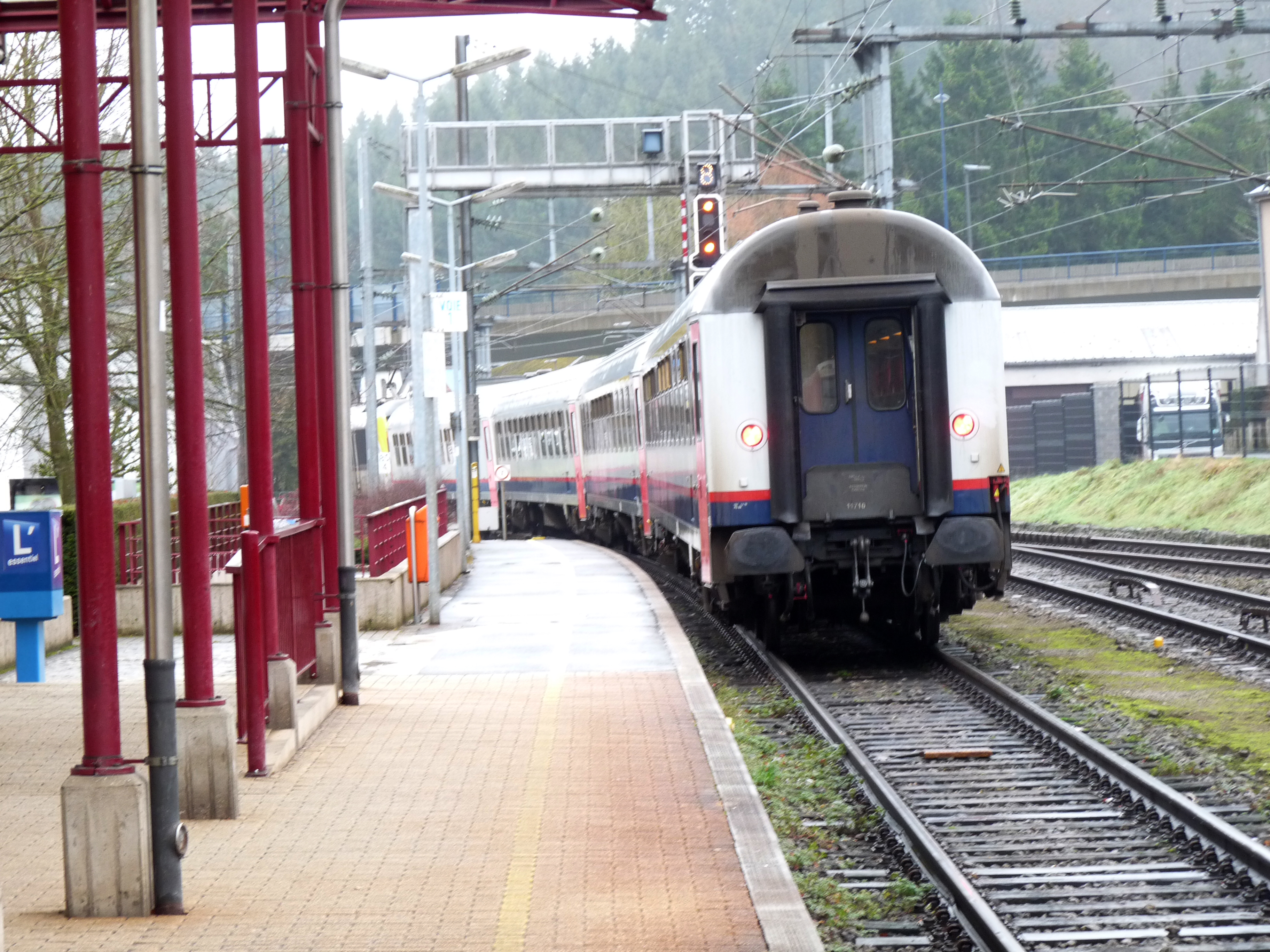 De IC trein Luik - Luxemburg